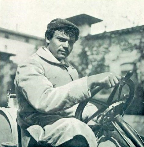 Victor Hémery, vainqueur de la Coupe Vanderbilt 1905 (La Vie au Grand Air du 20 octobre 1905)